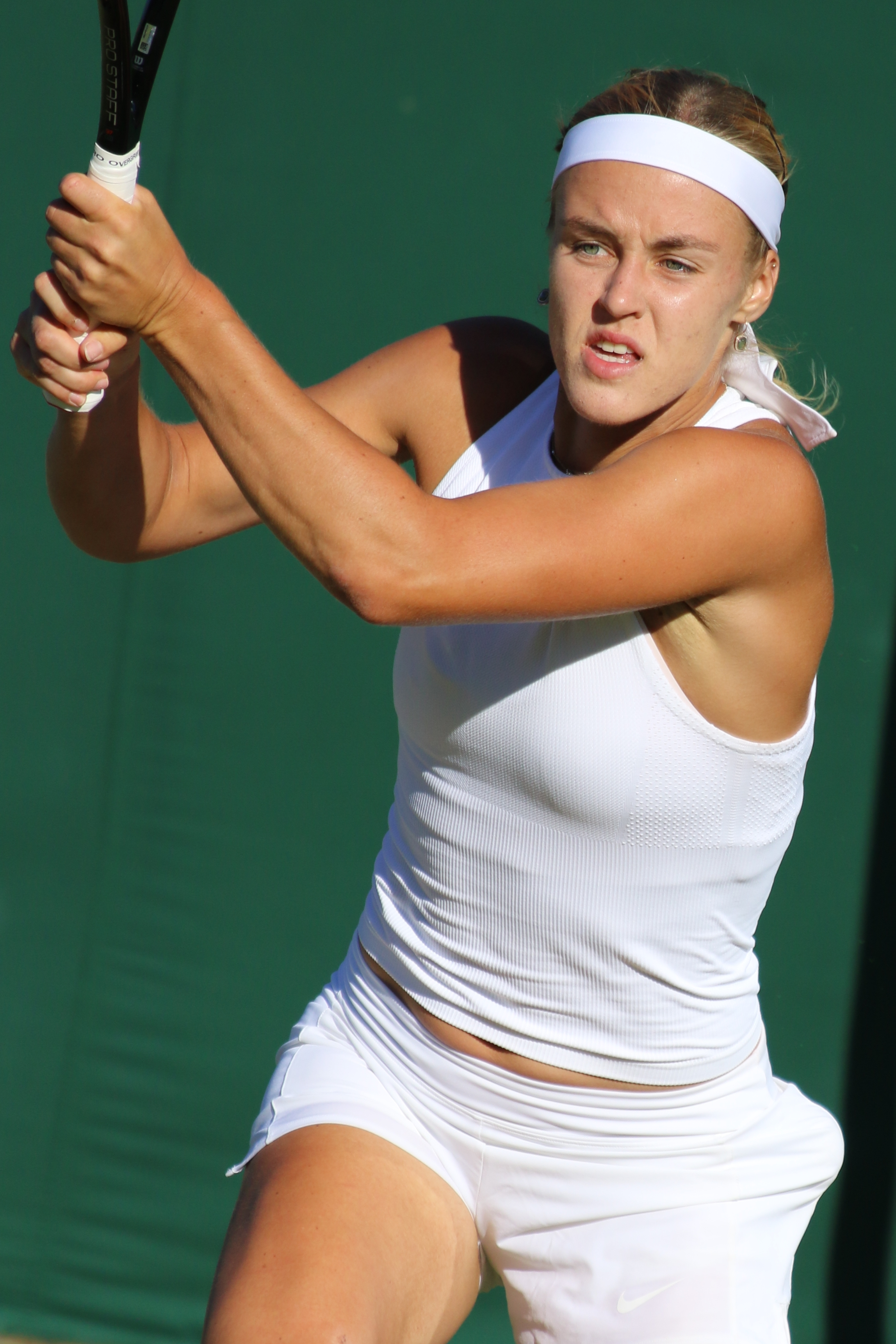 Schmiedlova WM18 (16)